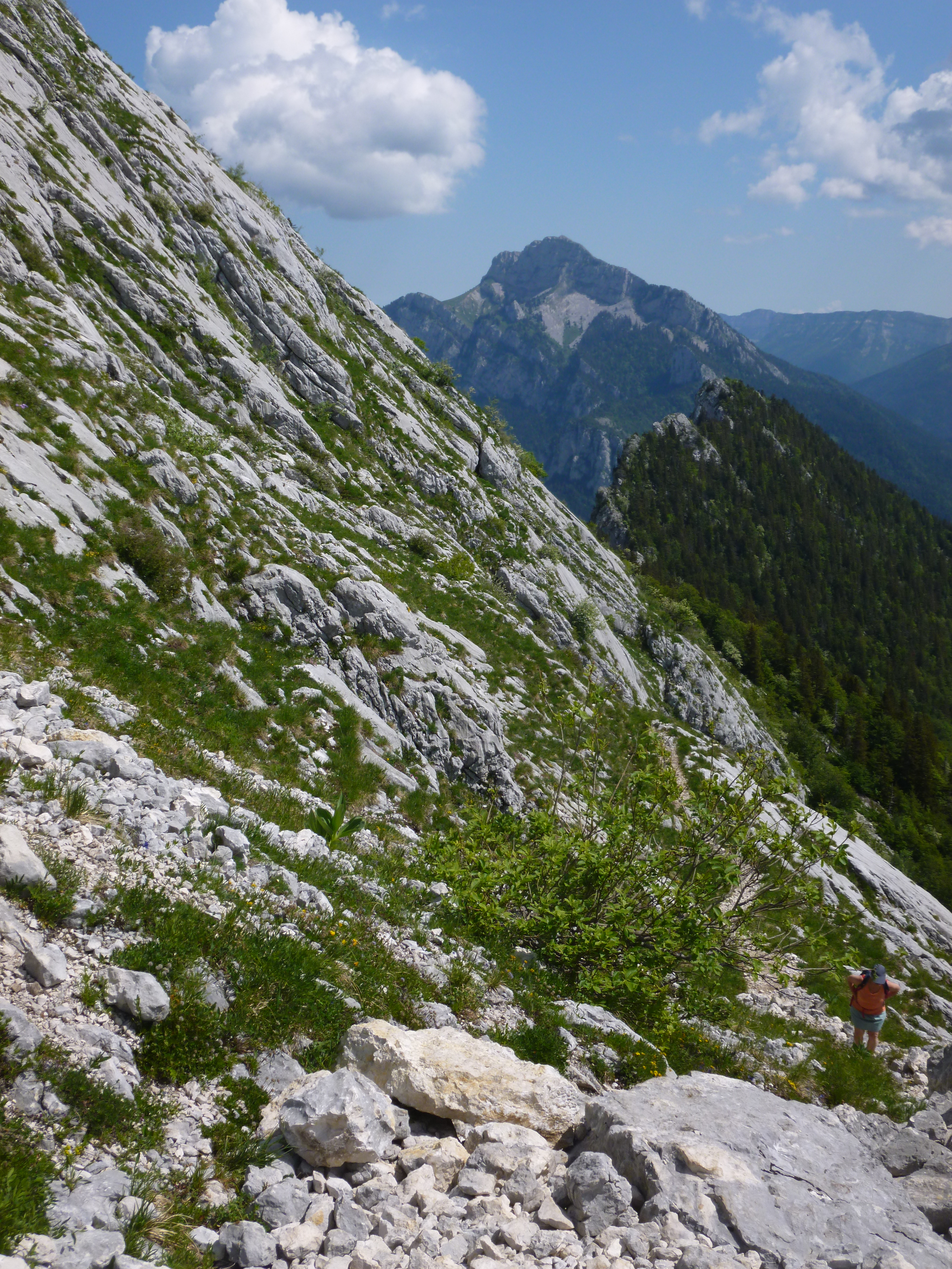 On peut voir le pendage important des couches.